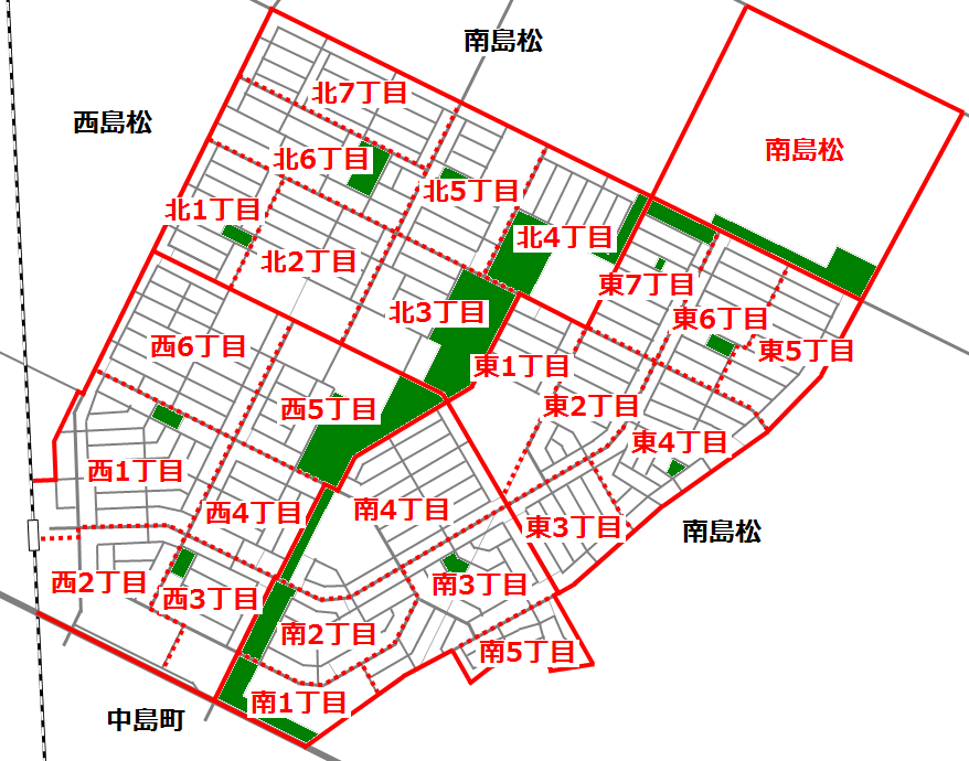 恵み野の区割り表示